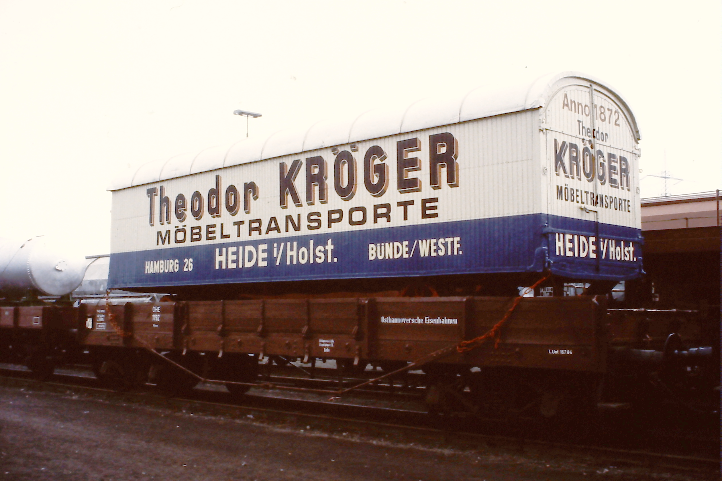 OHE Rlkmm 1192, ausgestellt auf der Fahrzeugschau 150 Jahre deutsche Eisenbahn in Bochum-Dahlhausen